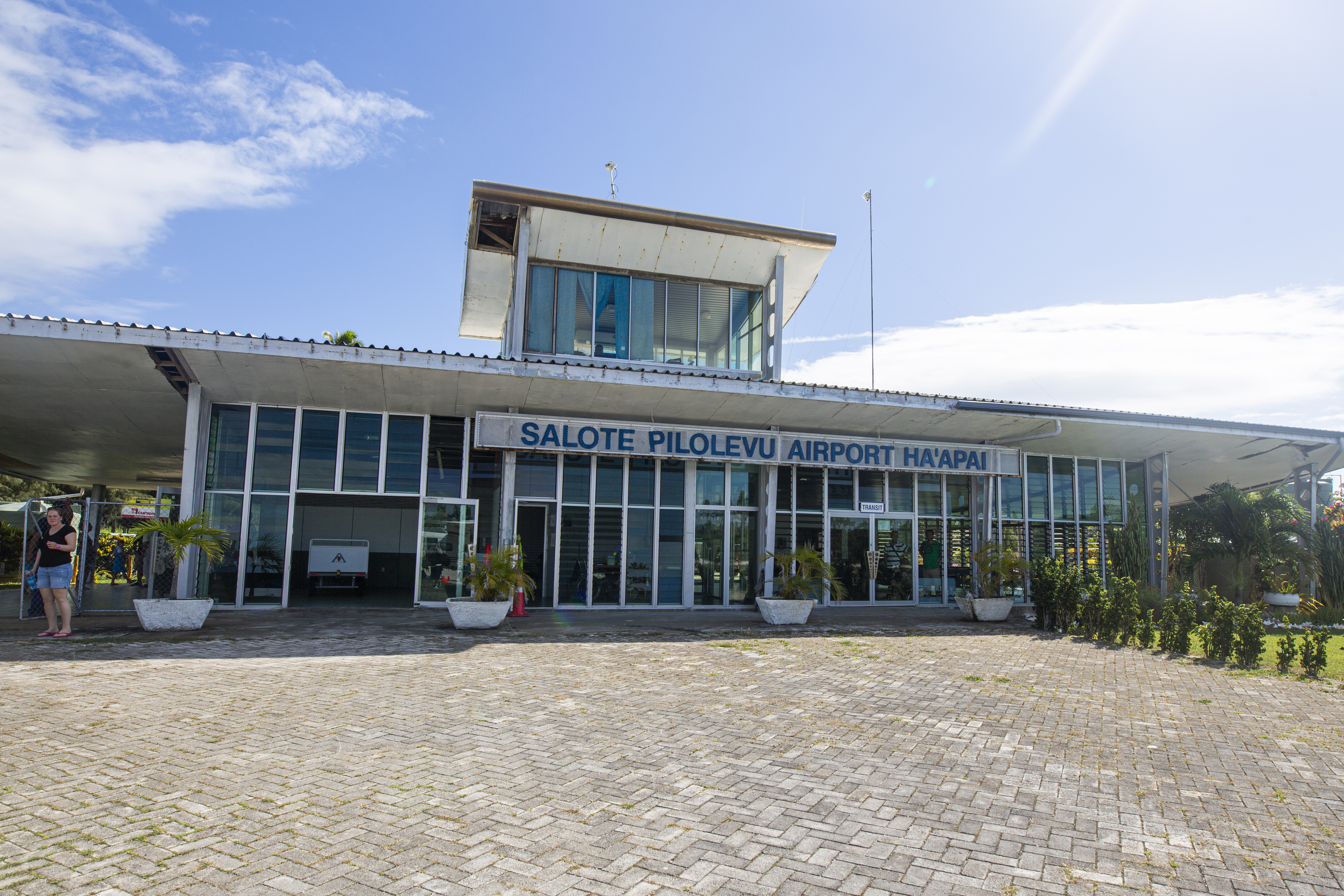 Salote Pilolevu Airport